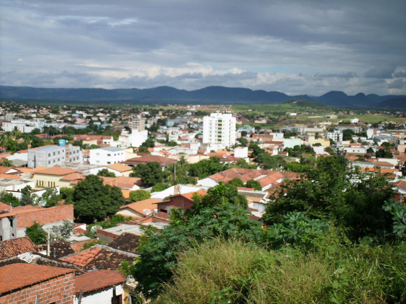 Cidade de Guanambi